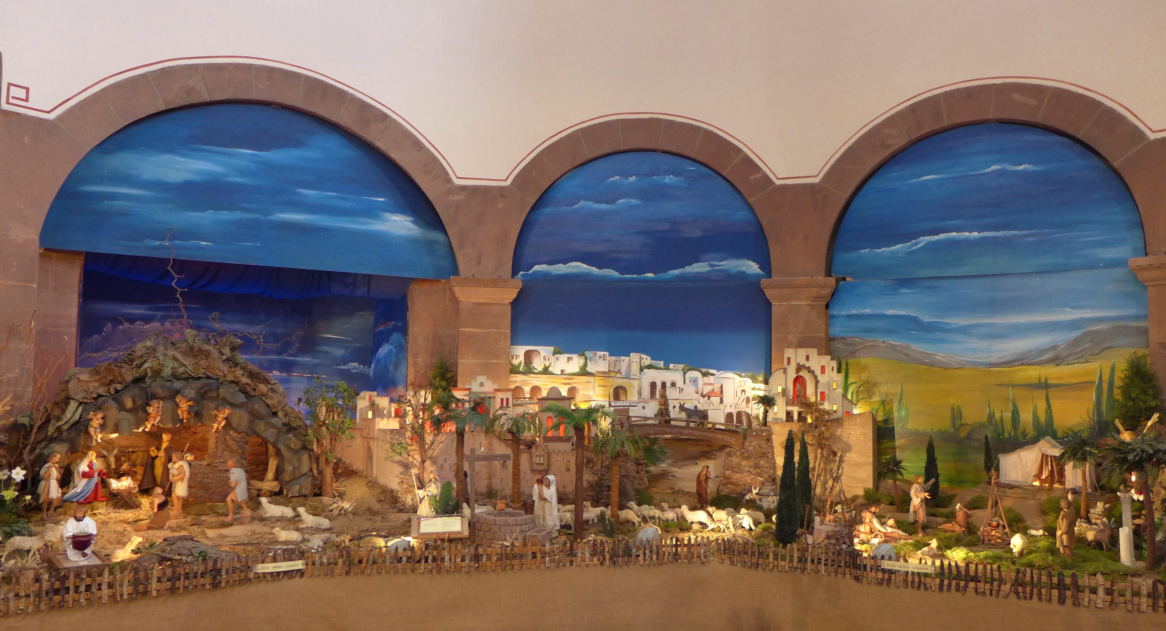 Saardom, Weihnachtskrippe